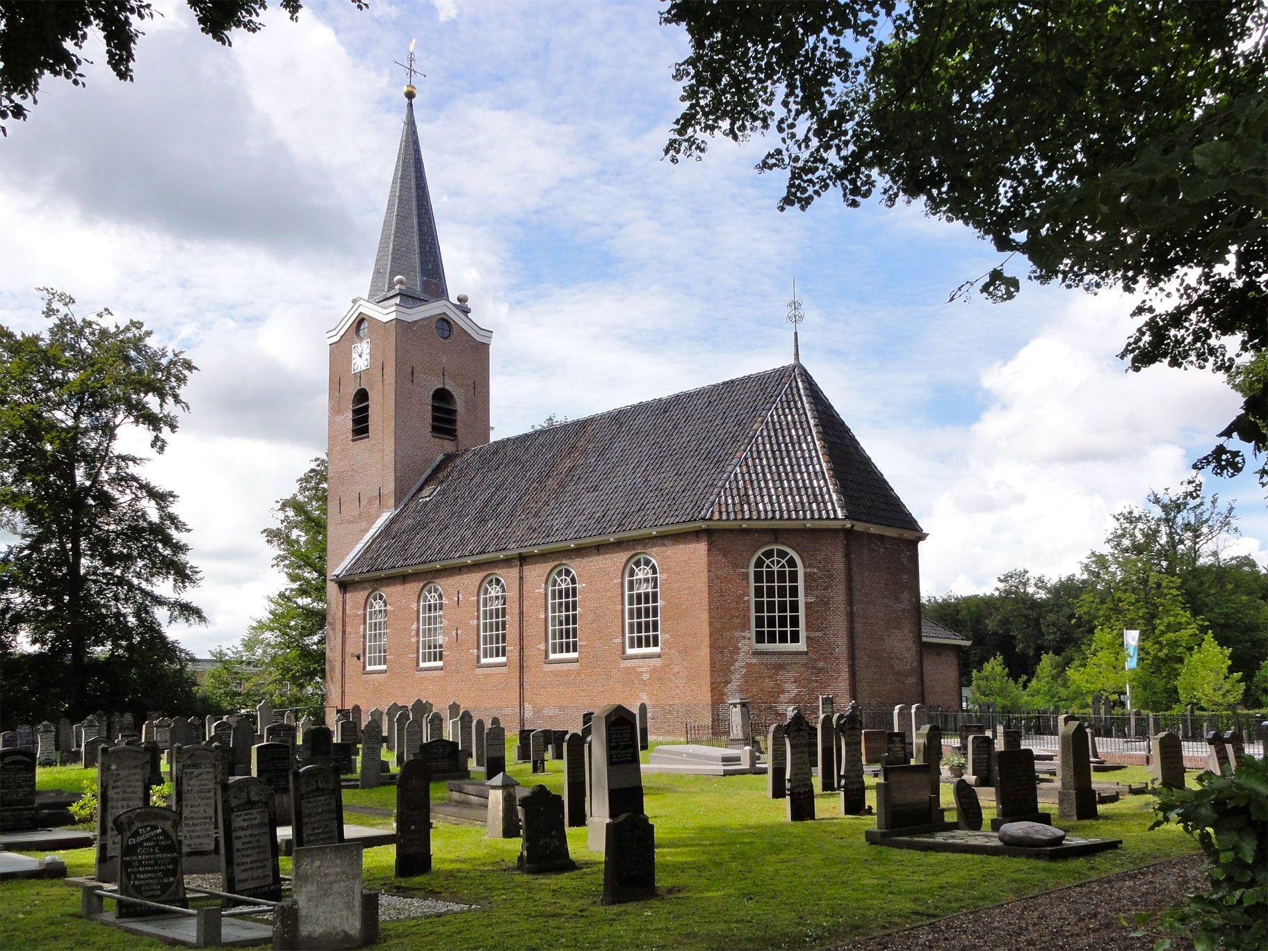 Kerk van Beetsterszwaag, Van Lyndenlaan 5 Beetsterzwaag